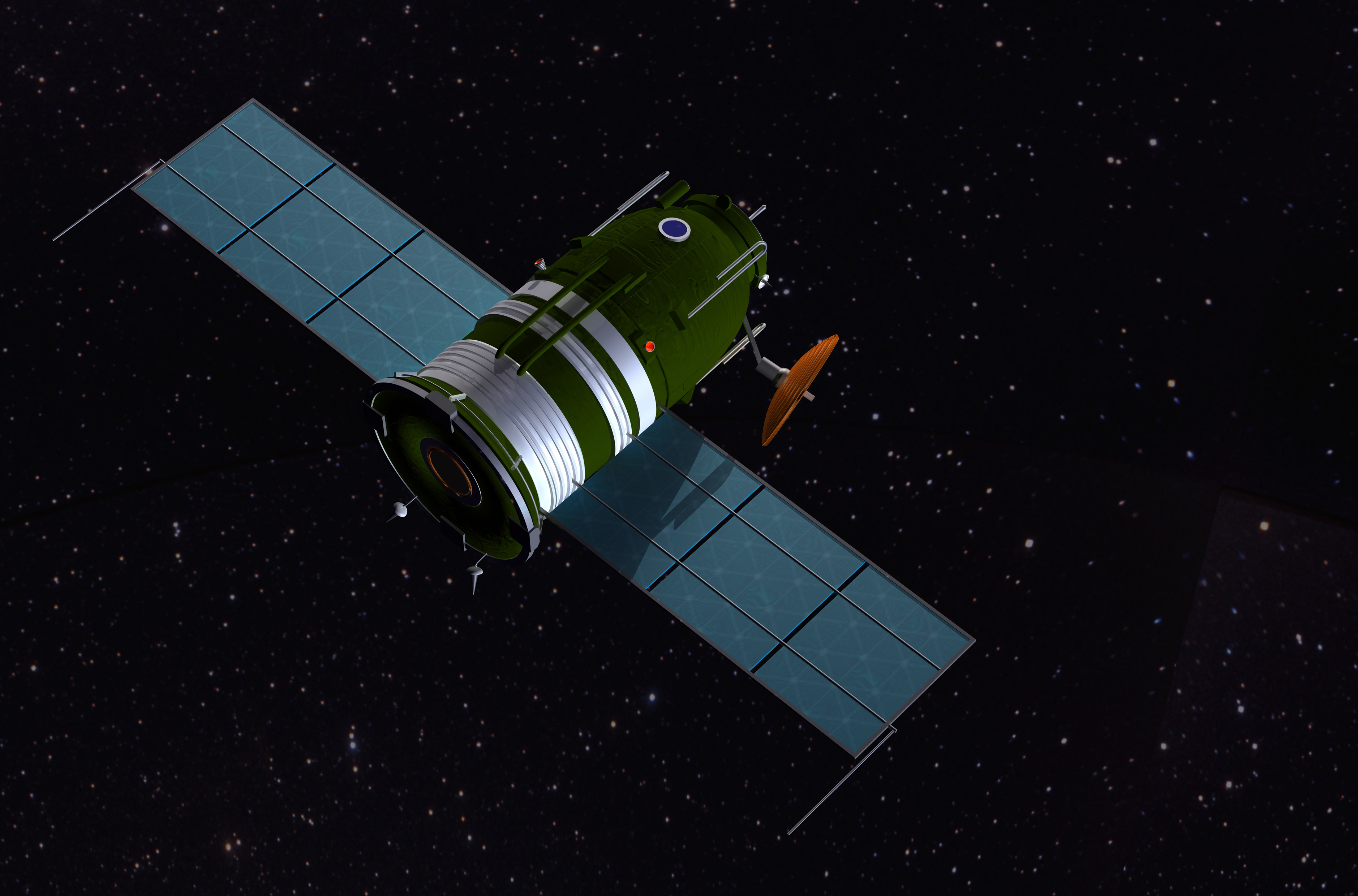 Darstellung der sowjetischen ZOND Sonde